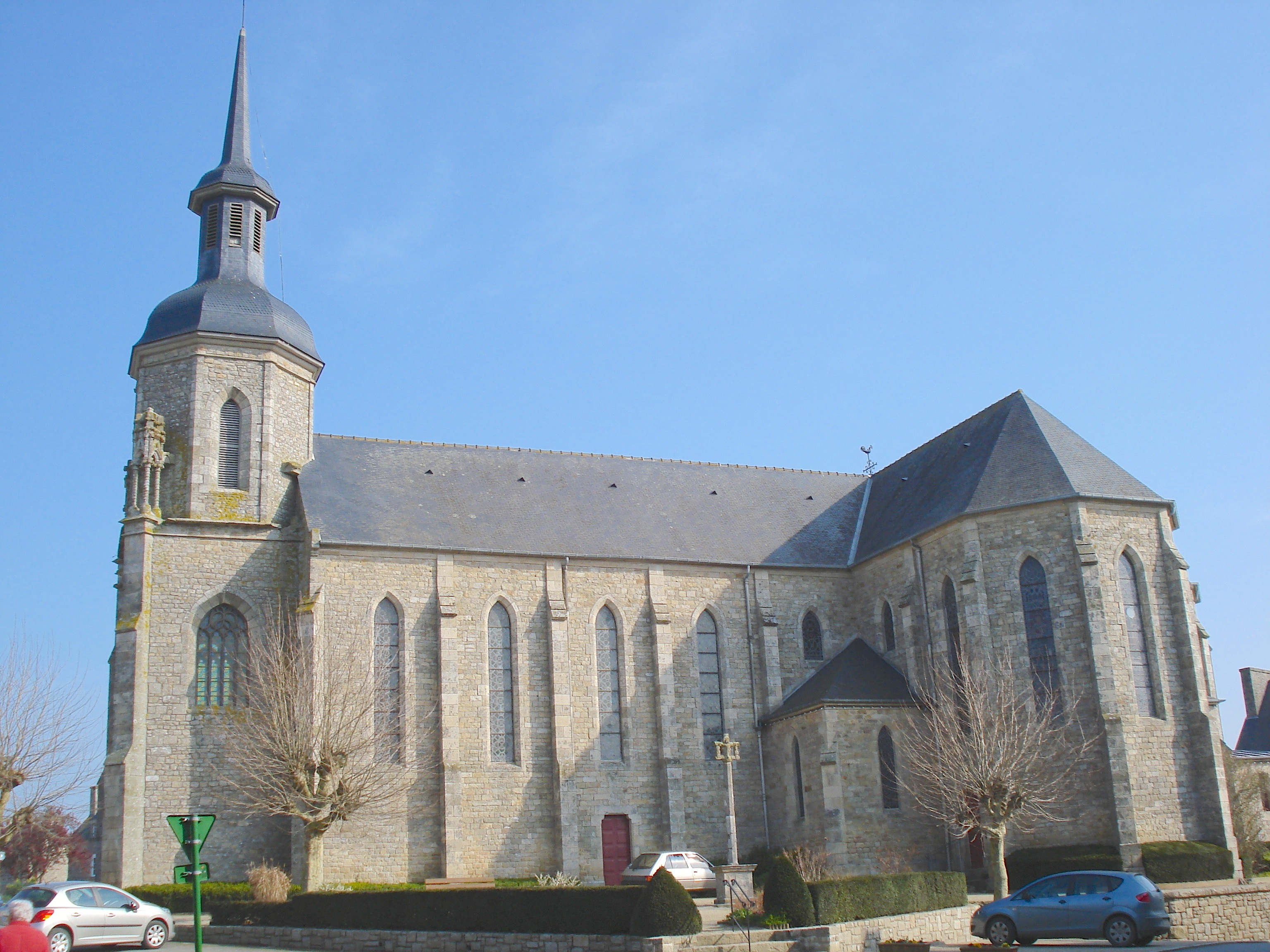 Preĝejo Saint-Pierre-es-Liens de Plélan-le-Petit, Francio